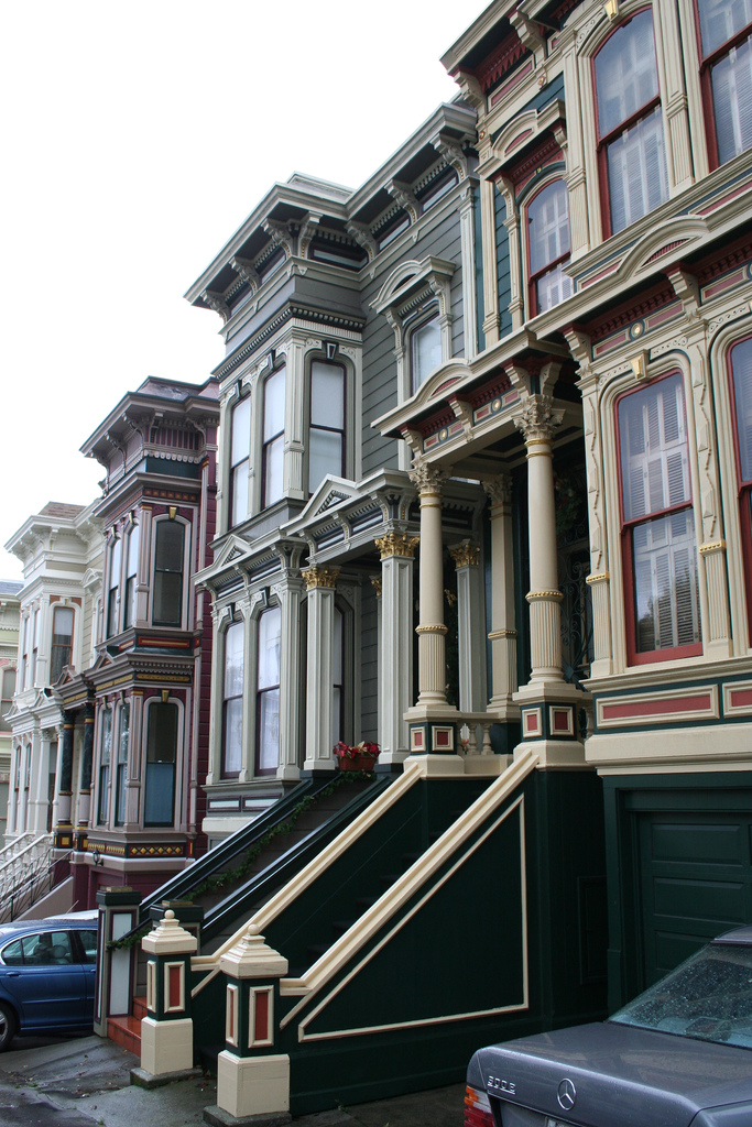 San Francisco, USA